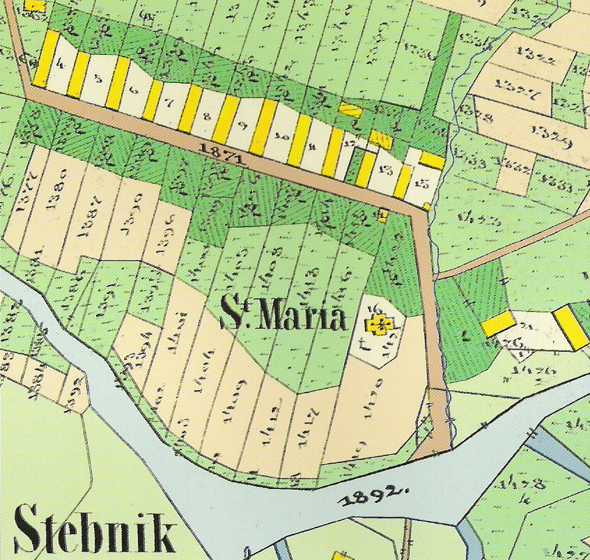 Mapa katastralna wsie Stebnik pow. bieszczadzki, woj. podkarpackie z 1852, zabudowa wsi w formie łańcuchówki dla osadników niemieckich 1783